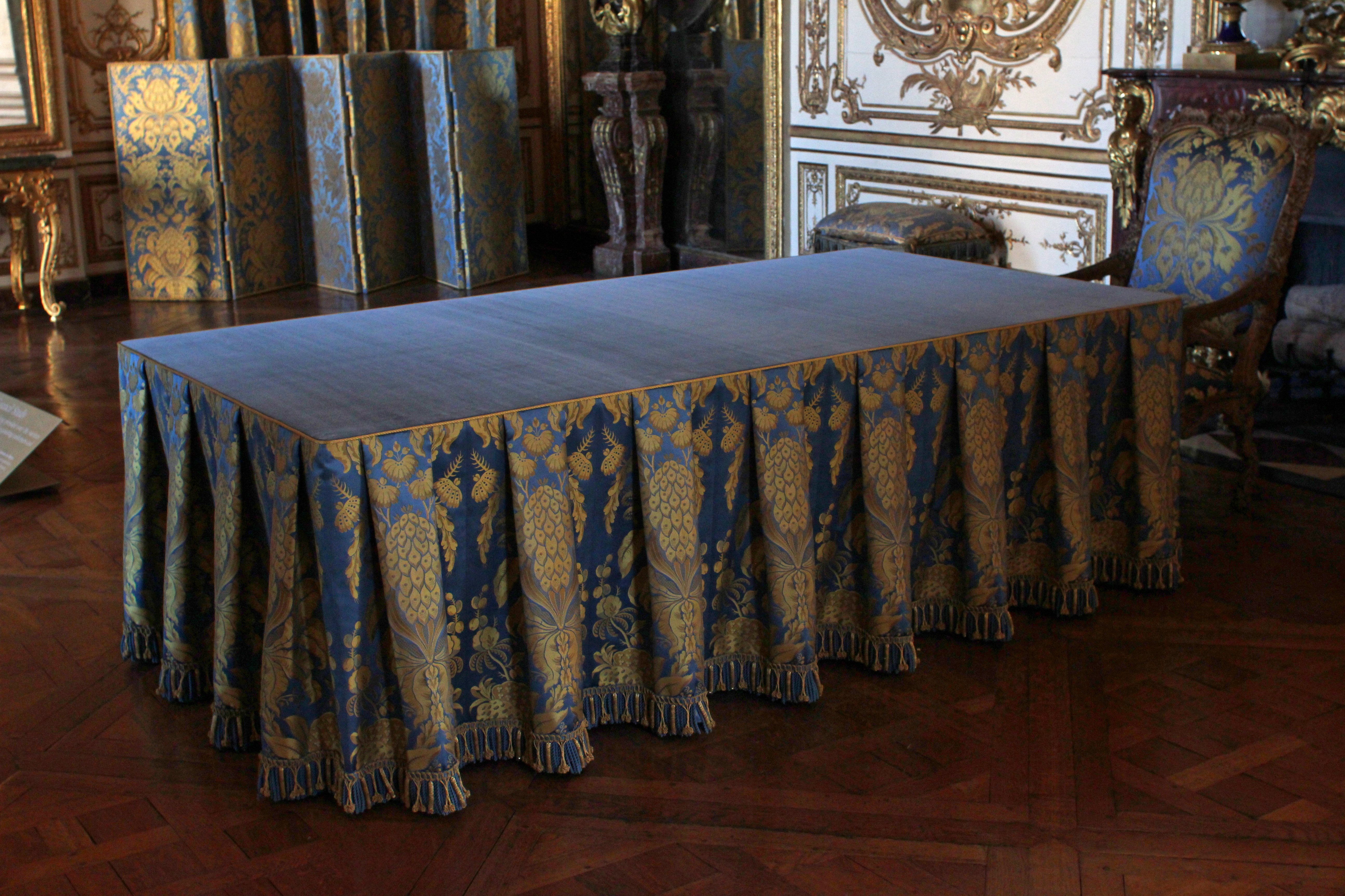 Table du conseil de forme rectangulaire (restitution récente de la table d'origine livrée en 1701 qui était en albâtre reposant sur un pied). Sa « jupe » est taillée dans un damas bleu céleste et or, qui évoque le tissu qui meublait le salon sous Louis XV.